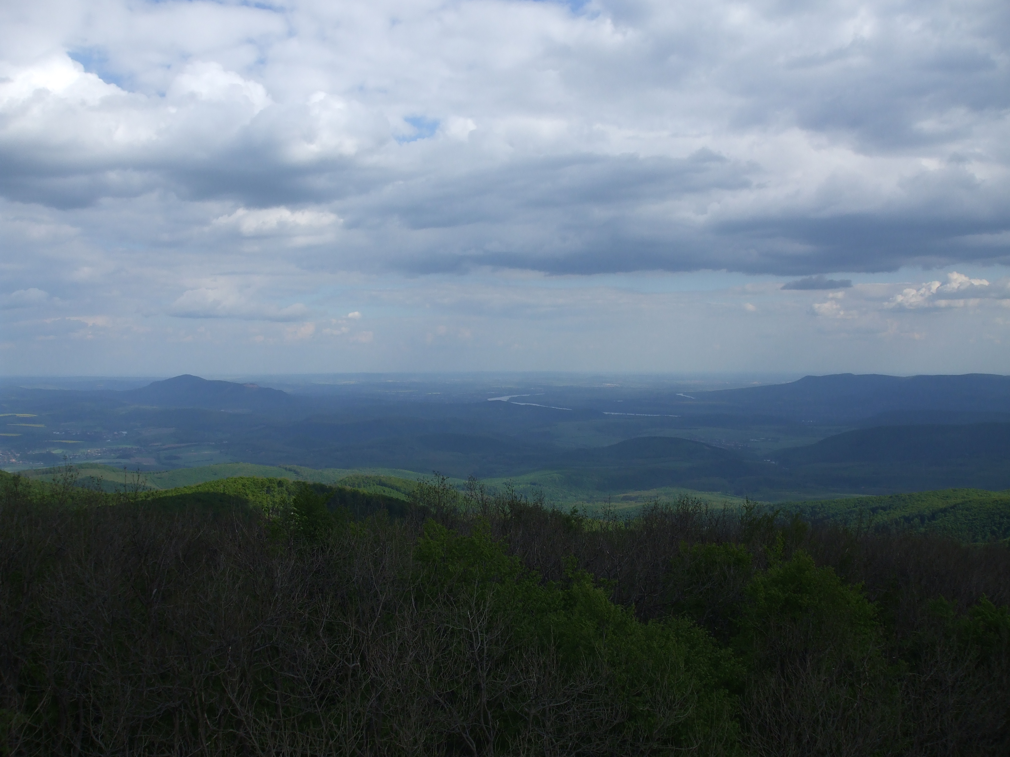 Kilátás a Csóványos tetején található kilátóból, Börzsöny-hegység, Magyarország